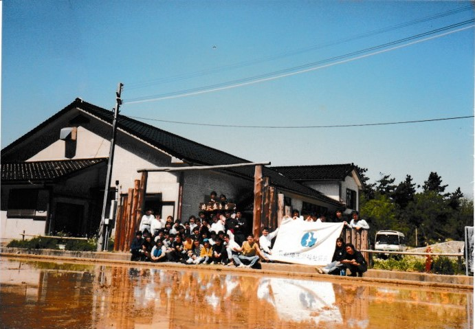 本館ゲート前で記念撮影。